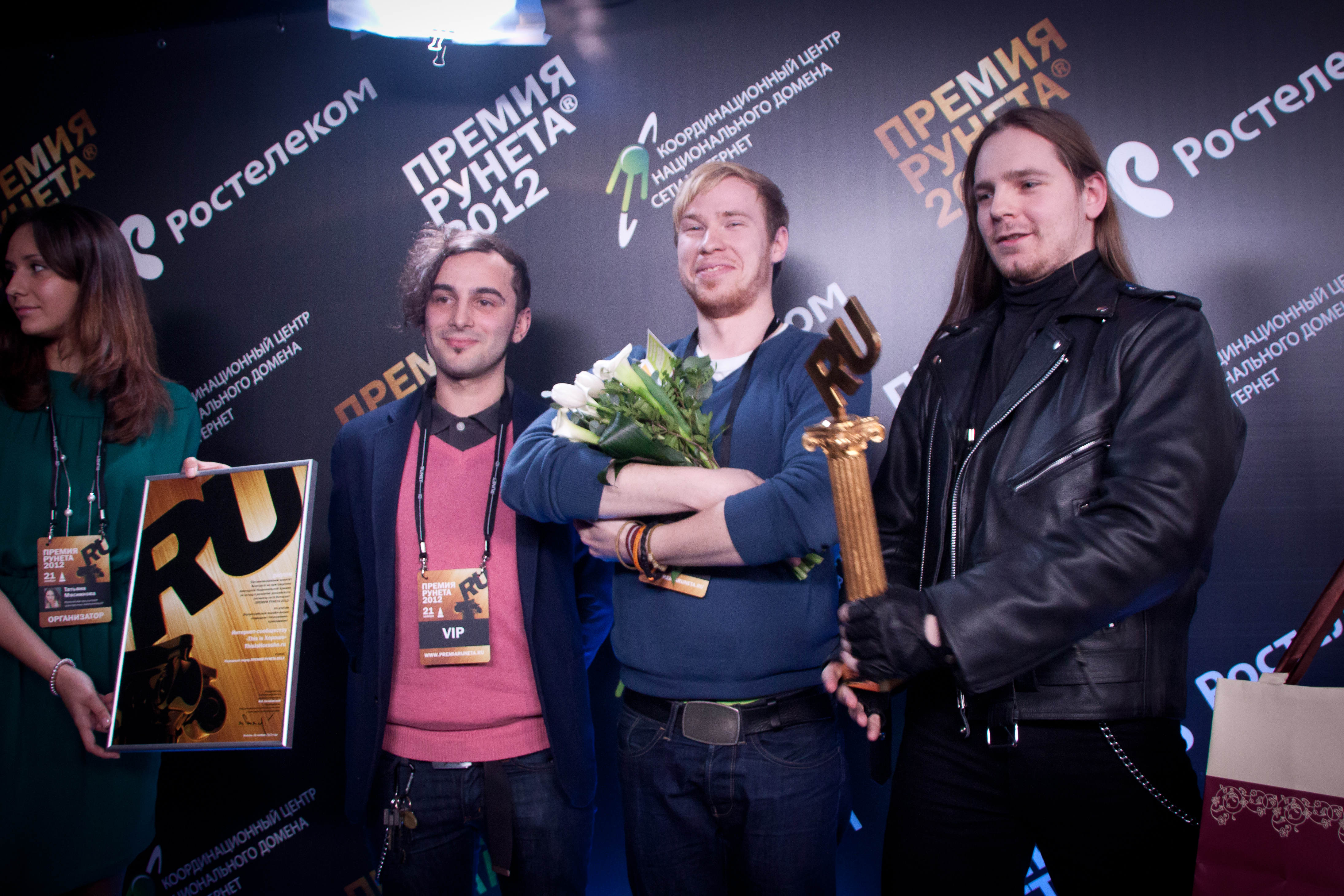 Премия Рунета - 2012